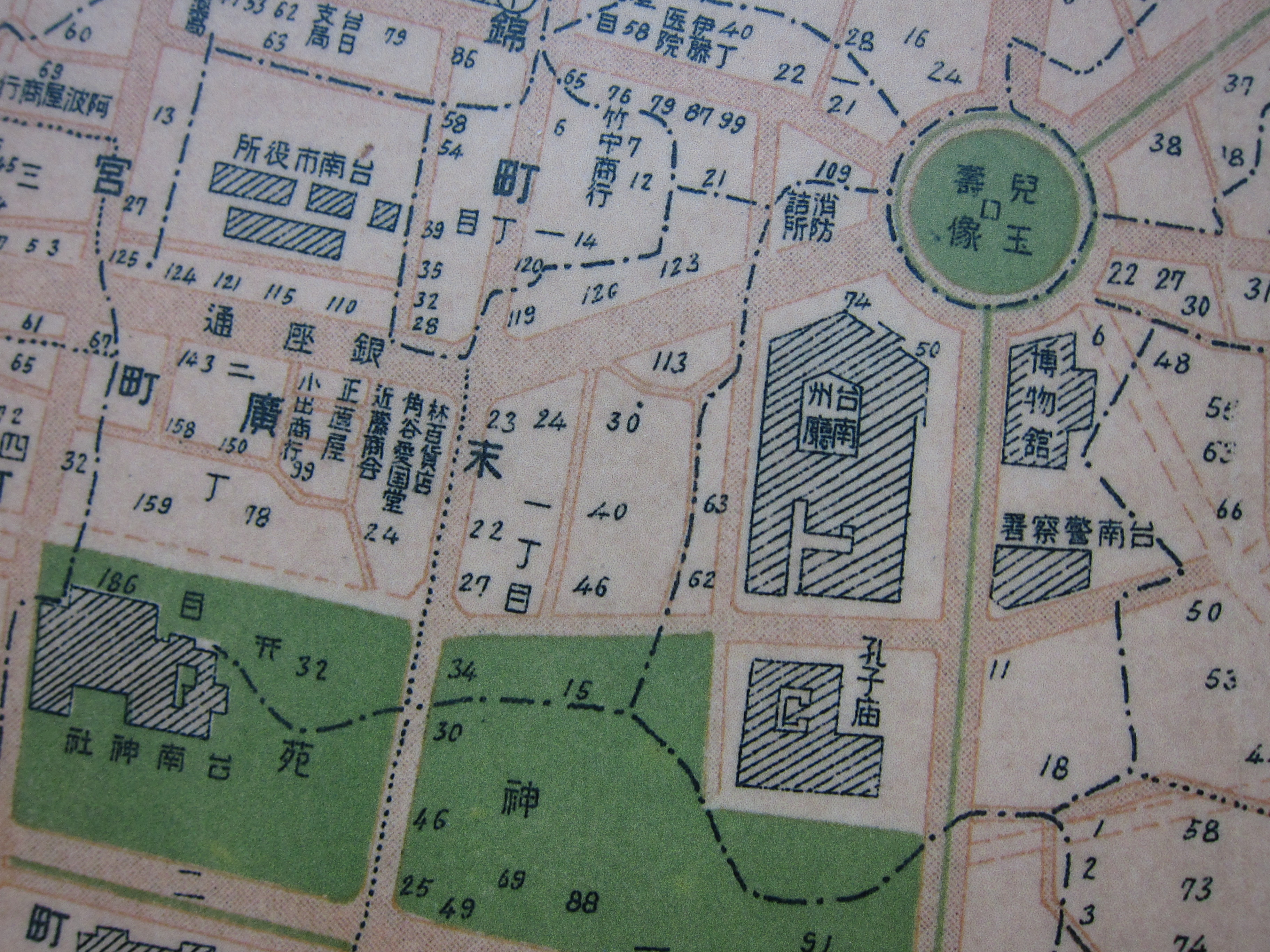 中文（台灣）: 台南神社1920年代左右全區配置圖（北面為圖面上方），神社四周圍分別為東邊今南門路，北邊今友愛街、南邊今府前路、西邊今永福路，兩塊綠地中間道路為今忠義路。左邊綠地為台南神社內苑（今第11號公園及地下停車場），右邊綠地為神社外苑及孔子廟（今忠義國小校舍及操場），日本神社內苑通常為祭祀空間，外苑則作為國民休閒娛樂或鍛鍊體魄的空間，後來建於孔廟西側的武德殿即建於本區。 神社南苑西南角原吳汝祥宅（座東朝西面向磚雅橋街，今永福路），後因北百川宮親王死於宅第南側屋舍，日本政府將其去世寢殿闢為「御遺跡所」並陸續增添神門、拜殿、圍籬等設施，範圍大約是里民活動中心及實踐堂範圍，整體建築軸線為座北朝南（面向今府前路）。1920年代以後在御遺跡所東側闢建台南神社，並於1923年落成，增建鳥居、參道、石燈籠、社務所、拜殿、神明造樣式神社等，整體配置改為座西朝東（面向今忠義路）。